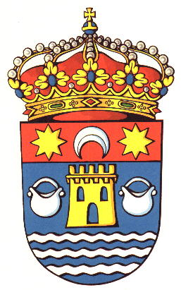 Escudo de Antas de Ulla. DOG núm. 27 (8 de febrero de 1995), página 1.108